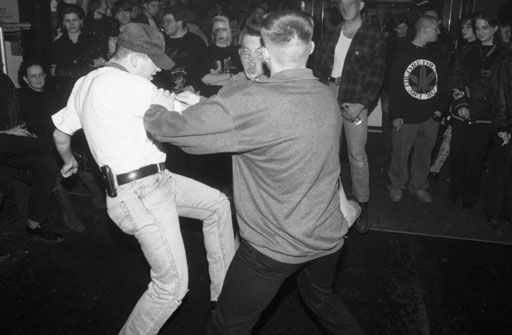 Rockabillys im Tanzcafe LiBella, Altenmarkt an der Alz